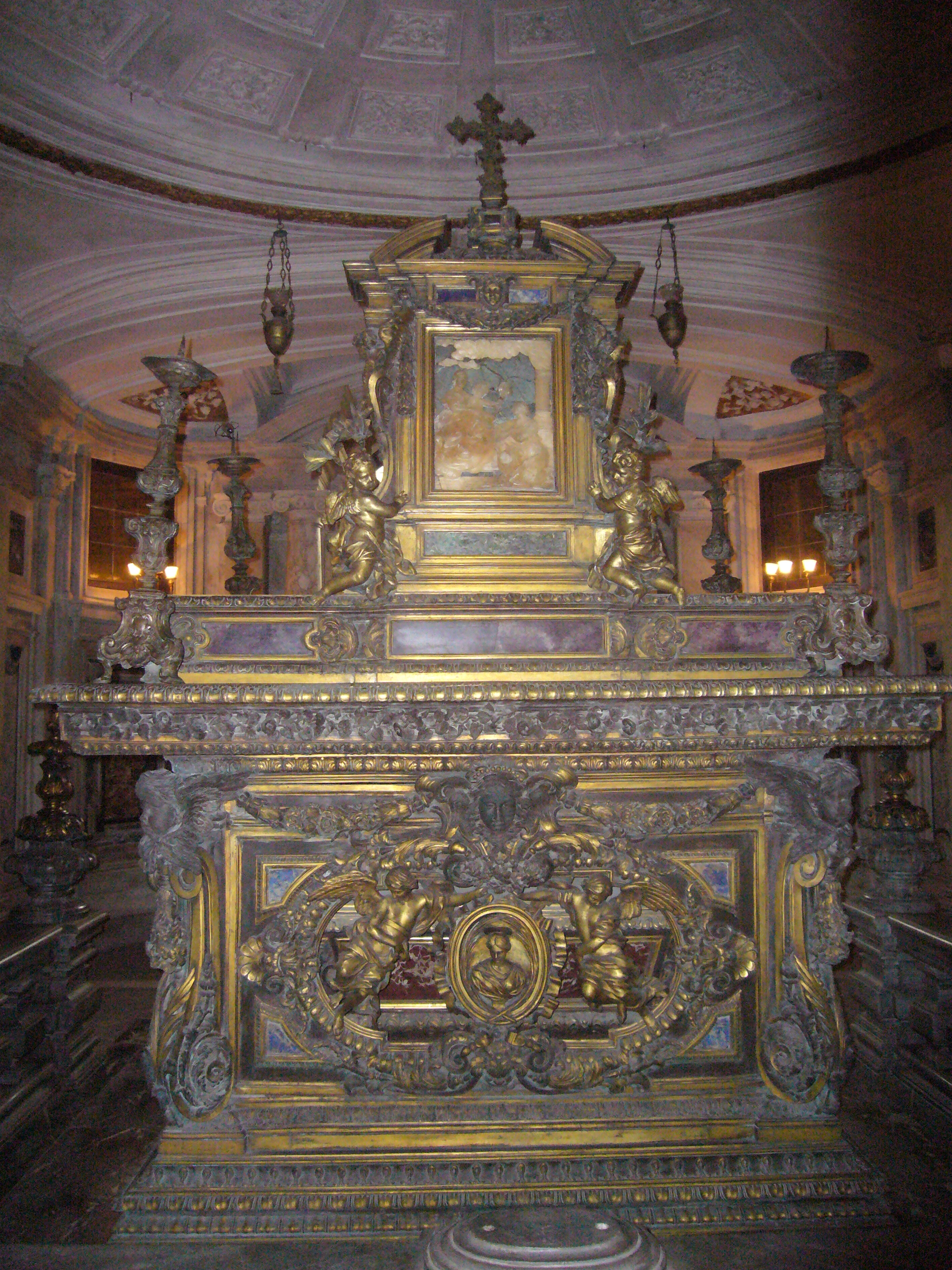 Roma, ss. Luca e Martina, altare della confessione nella cripta